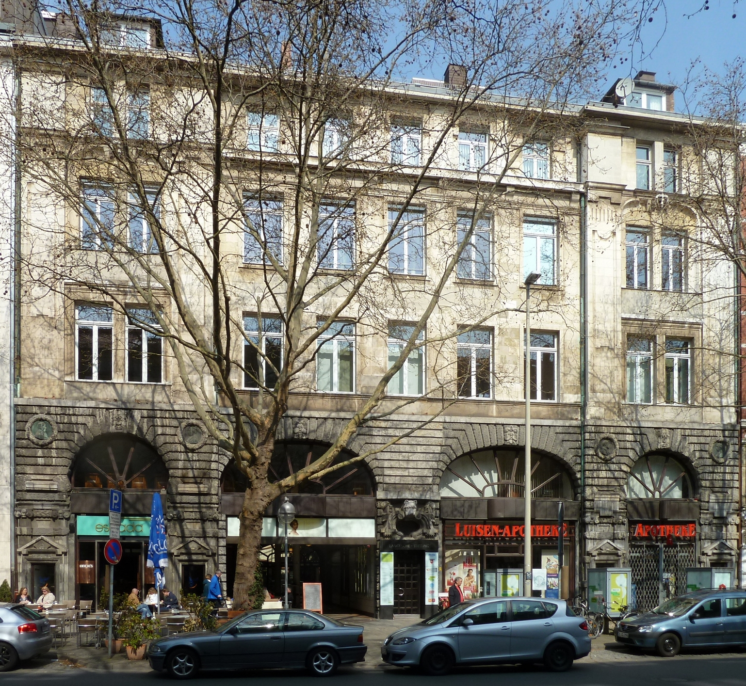 Das Wohn- und Geschäftshaus der Langeschen Stiftung in der Theaterstraße 14 in Hannover ...